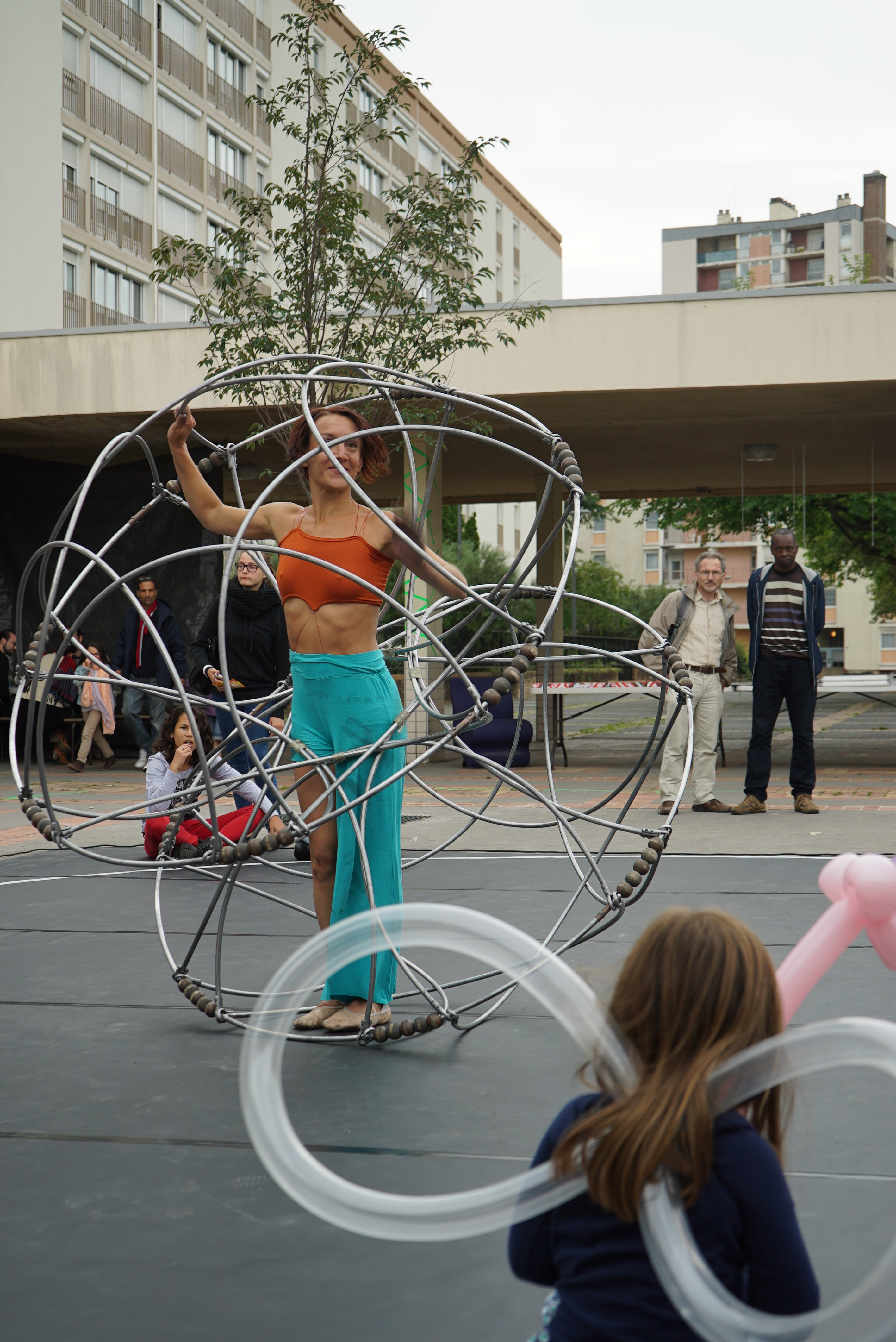 une vue du Quartier Europe (Reims), spectacle "art en place".